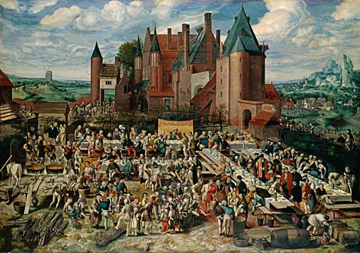 Monogrammiste de Brunswick, Le Repas des conviés, XVIe siècle, Herzog Anton Ulrich Museum, Brunswick